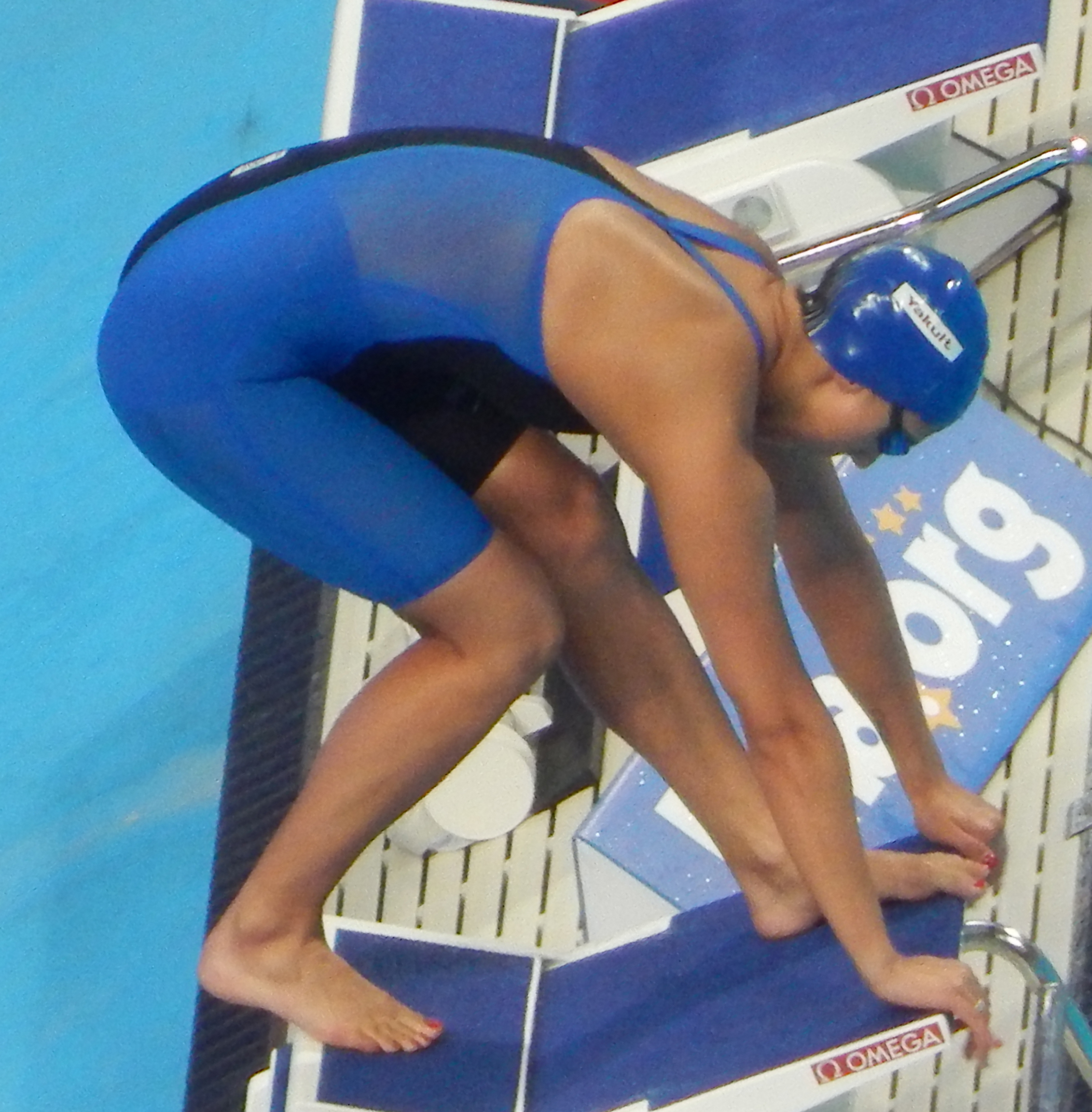 Эйми Уиллмотт в финале на дистанции 400 метров комплексом у женщин на чемпионате мира в Казани